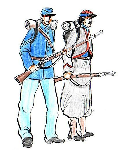 dessin personnel de Jp.negre